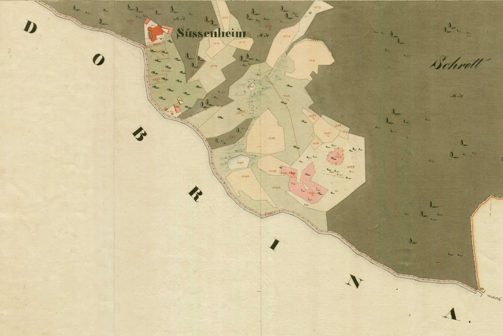 Franciscejski kataster za Štajersko, 1823-1869